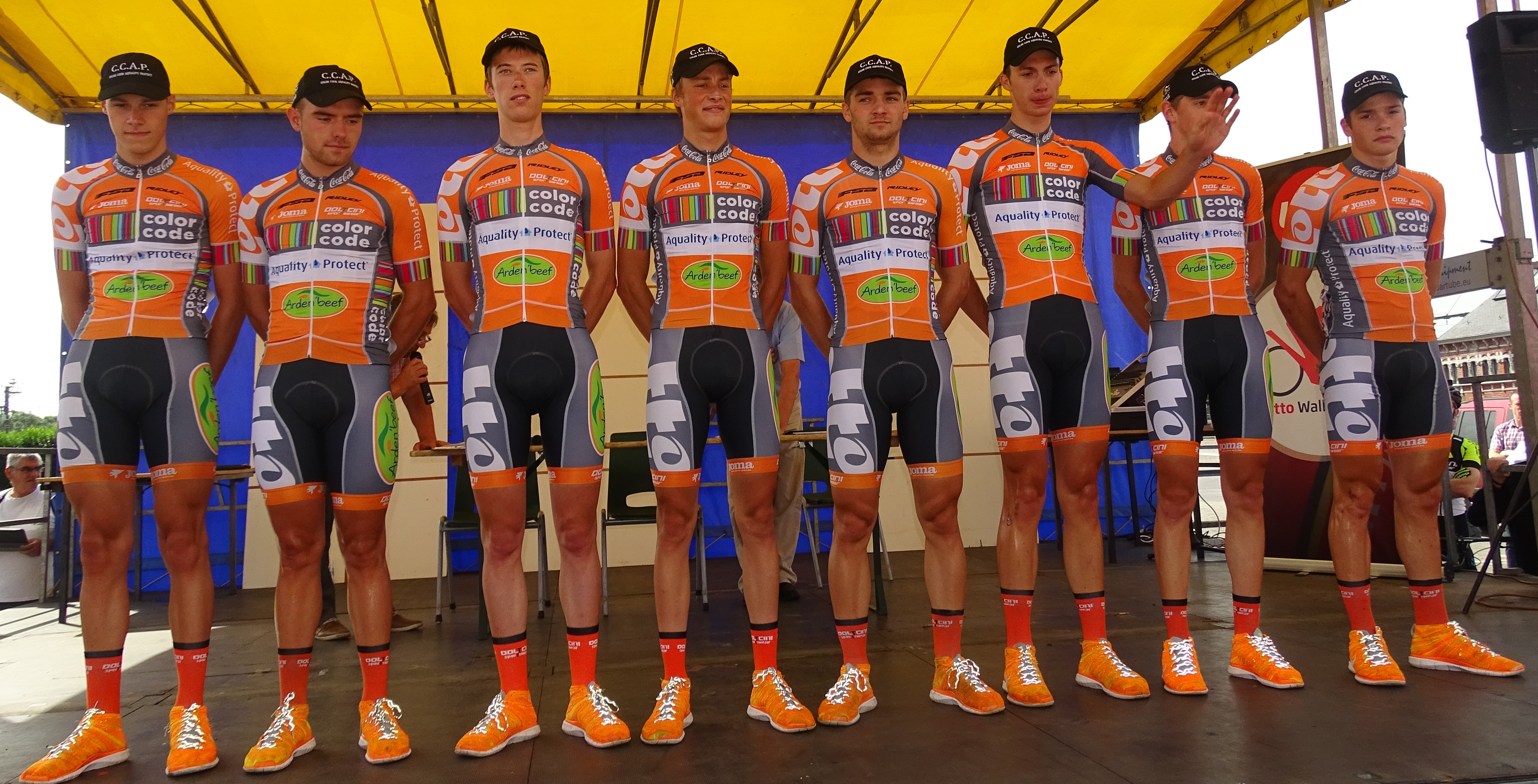 Reportage réalisé le mercredi 22 juillet à l'occasion du départ du Grand Prix Pino Cerami 2015 à Saint-Ghislain, Belgique.